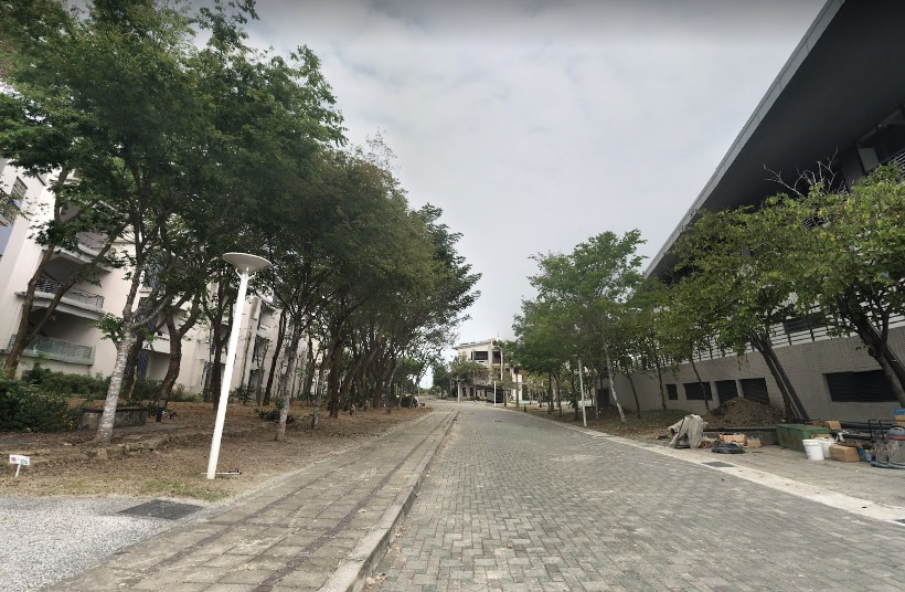 南科實中校園內部環境